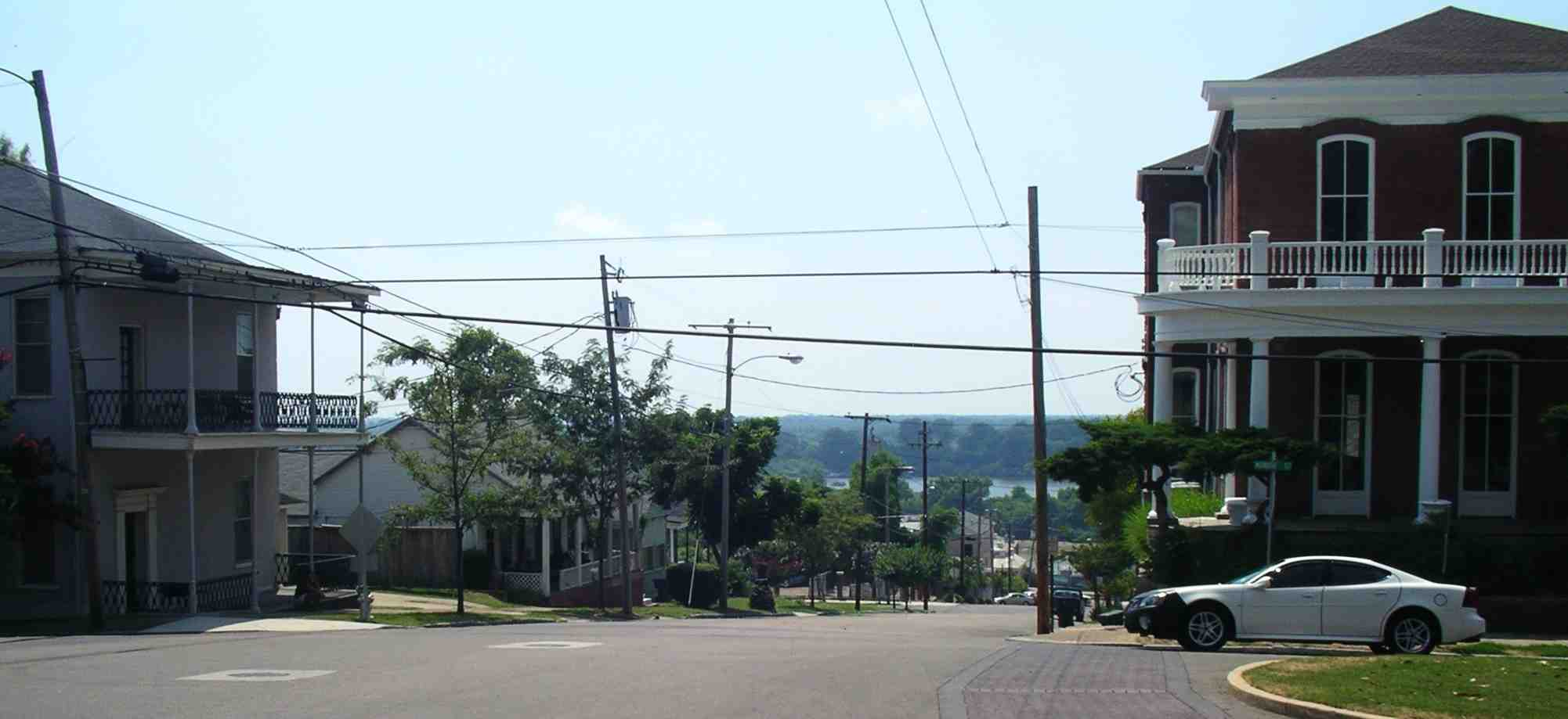 Downtown Vicksburg